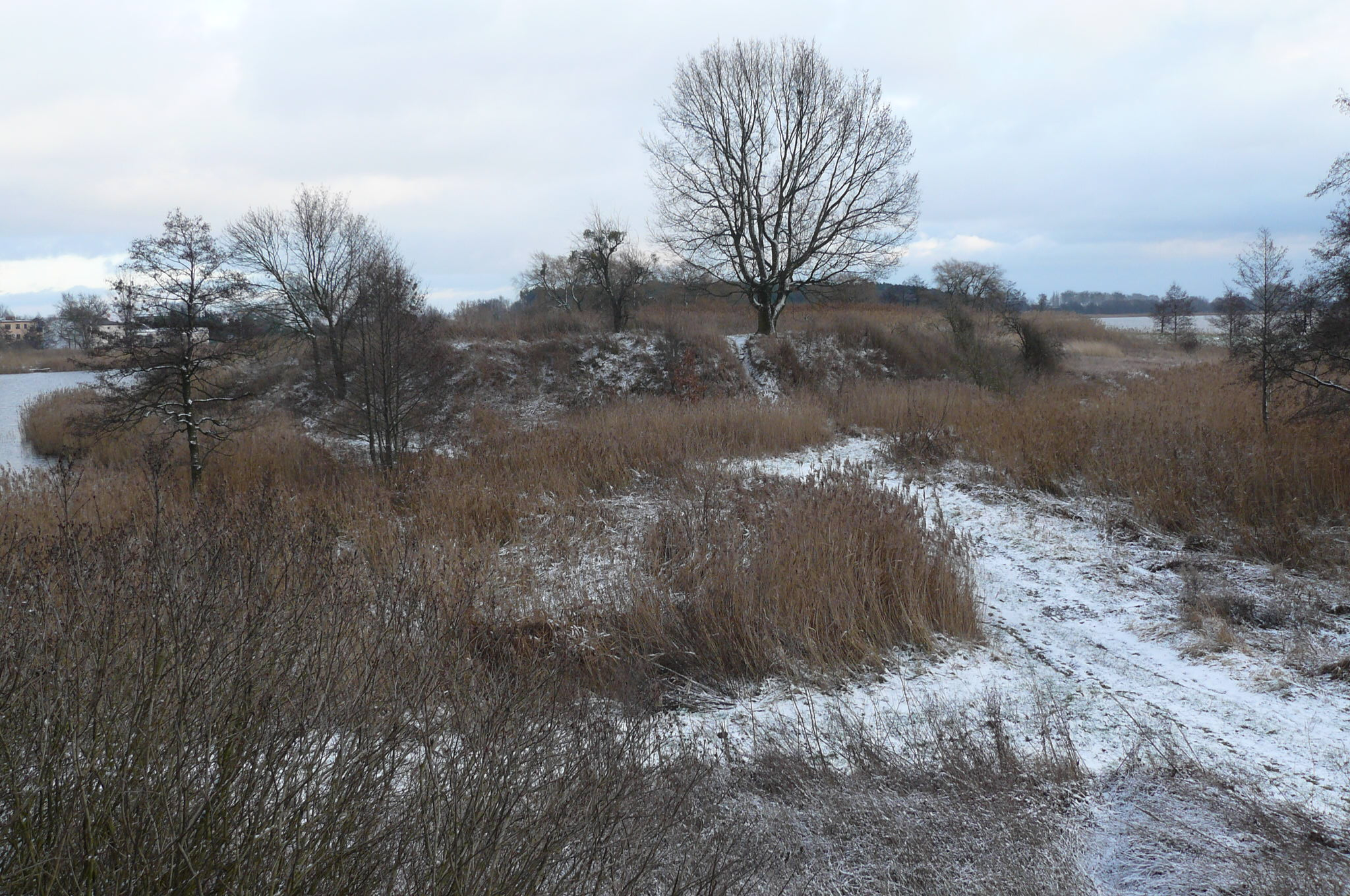 Bnin - płw. Szyja.